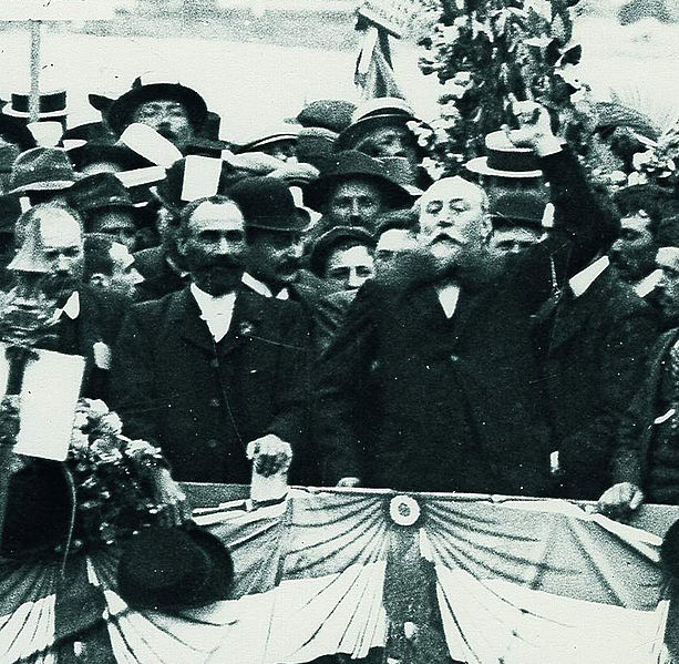 Albert et Feroul lors des manifestations de 1907 à Carcassonne